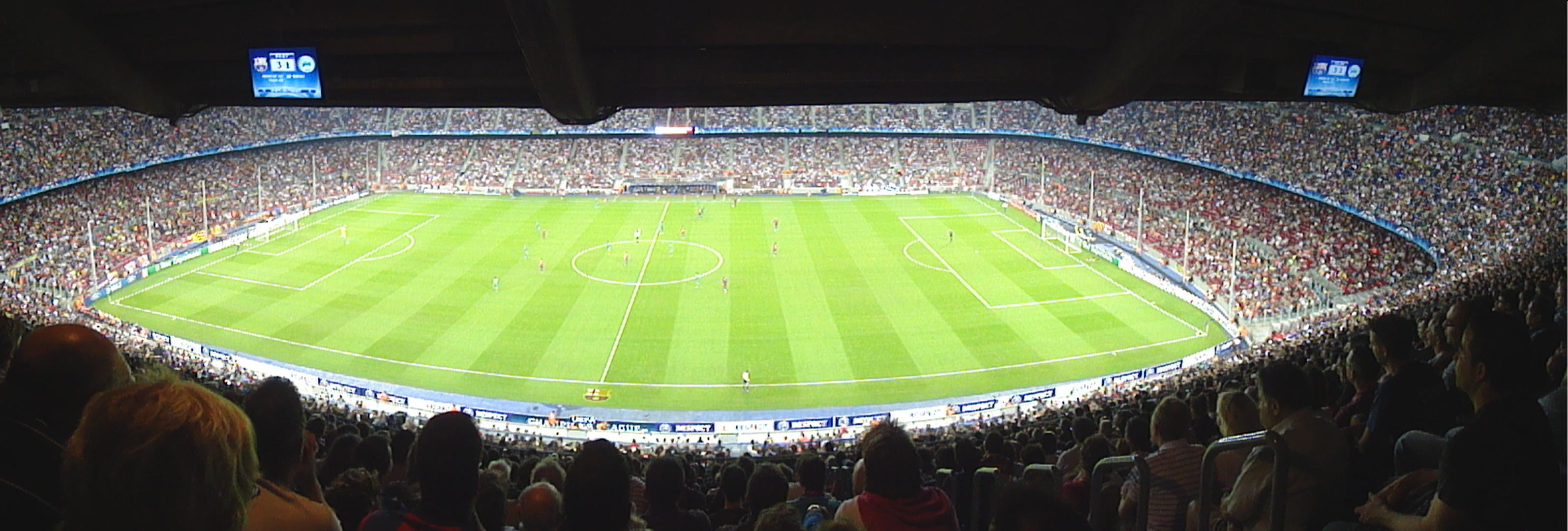 Imatge panoràmica del Camp Nou